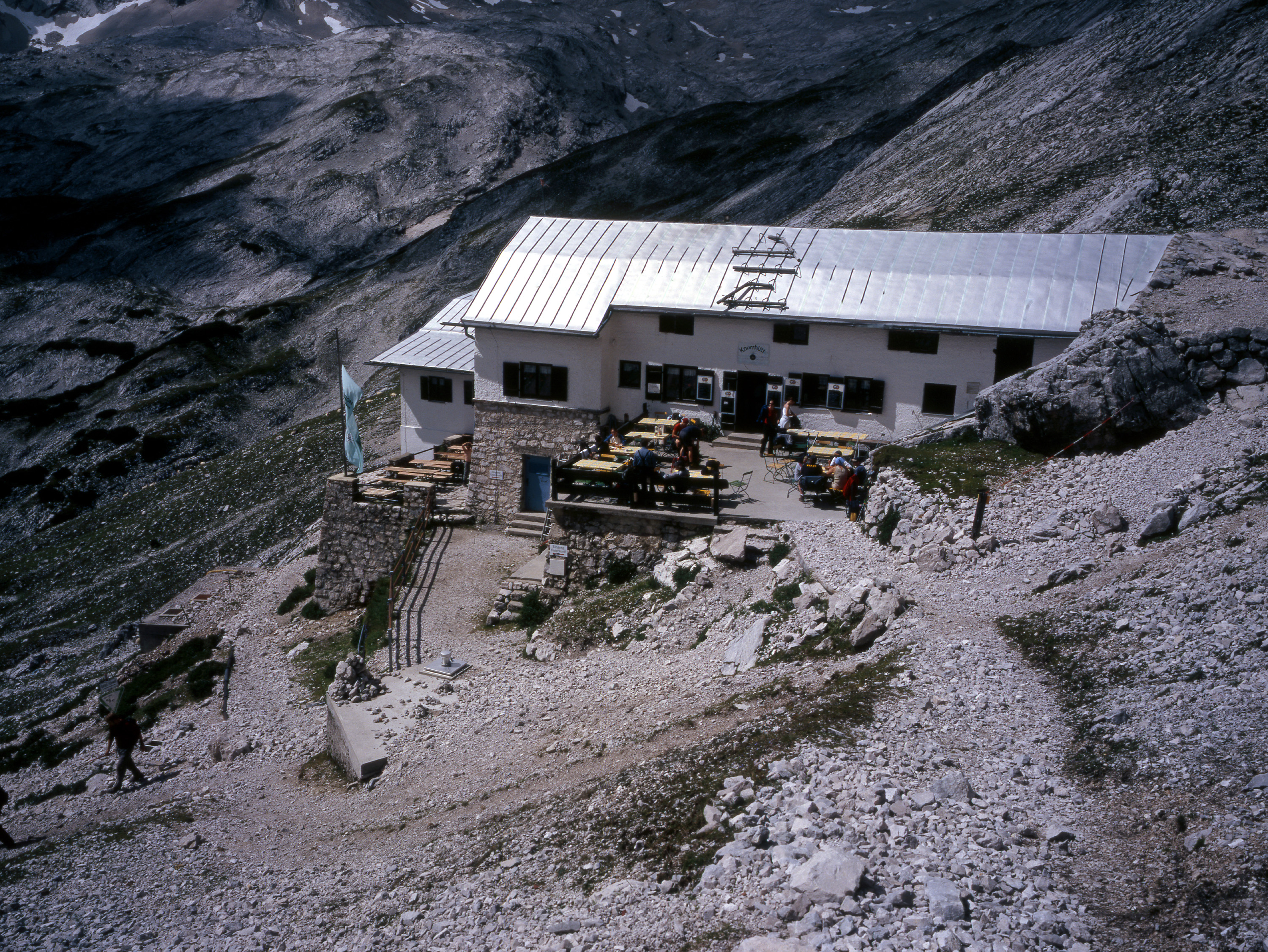 Deutschland, Bayern, Wettersteingebirge, Knorrhütte im Wettersteingebirge, 2004 Bildautor: Rüdiger Kratz, St. Ingbert Foto habe ich im September 2004 aufgenommen